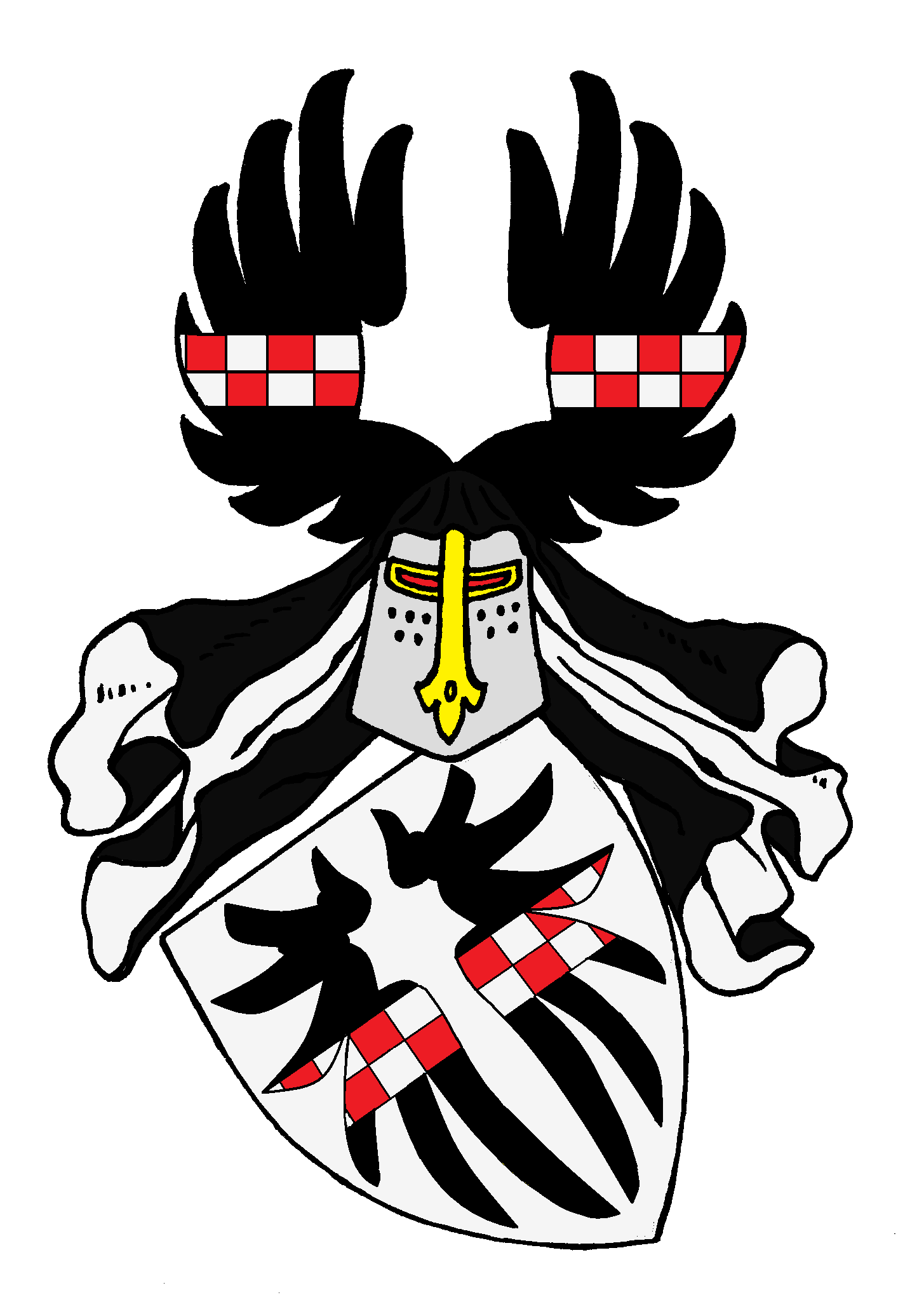 Wappen der Finecke, eines alten, abgestorbenen mecklenburgischen Adelsgeschlechts